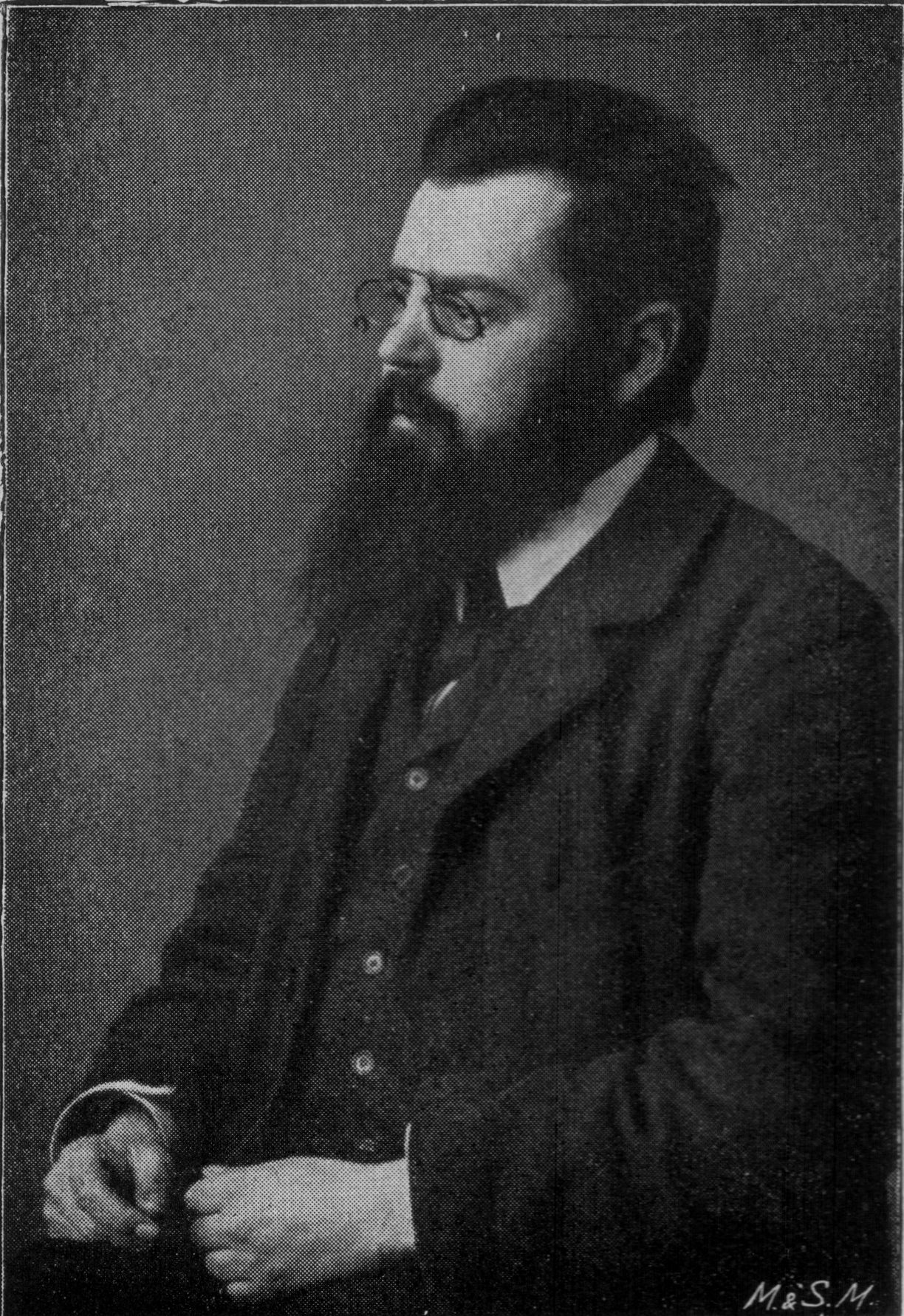 Portrait Anton Renk